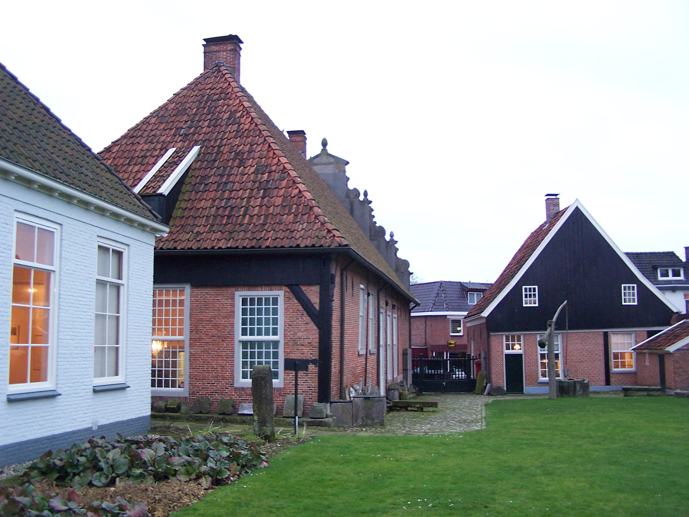 Oldenzaal: Backside museum 'Palthehuis'